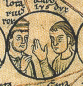 Lothar I. Francouzský a Karel Dolnolotrinský